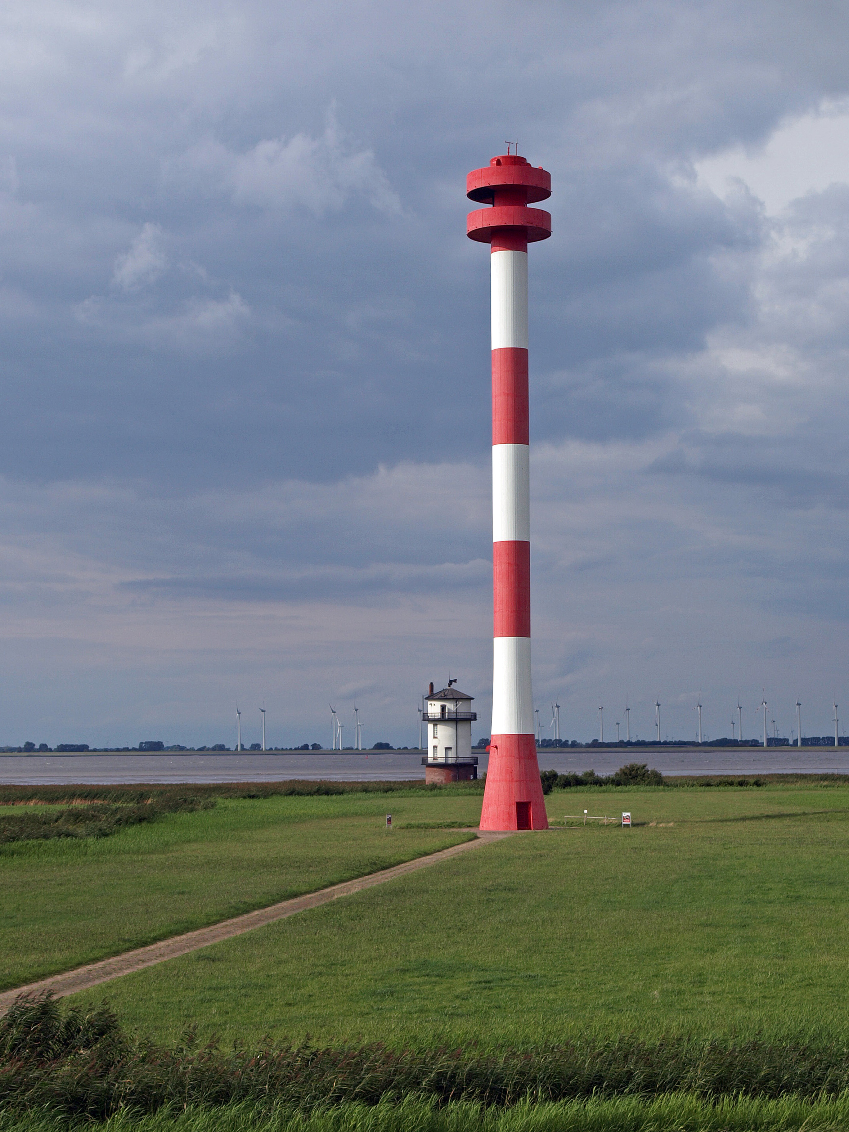 Oberfeuer in Balje in Betrieb seit 1980